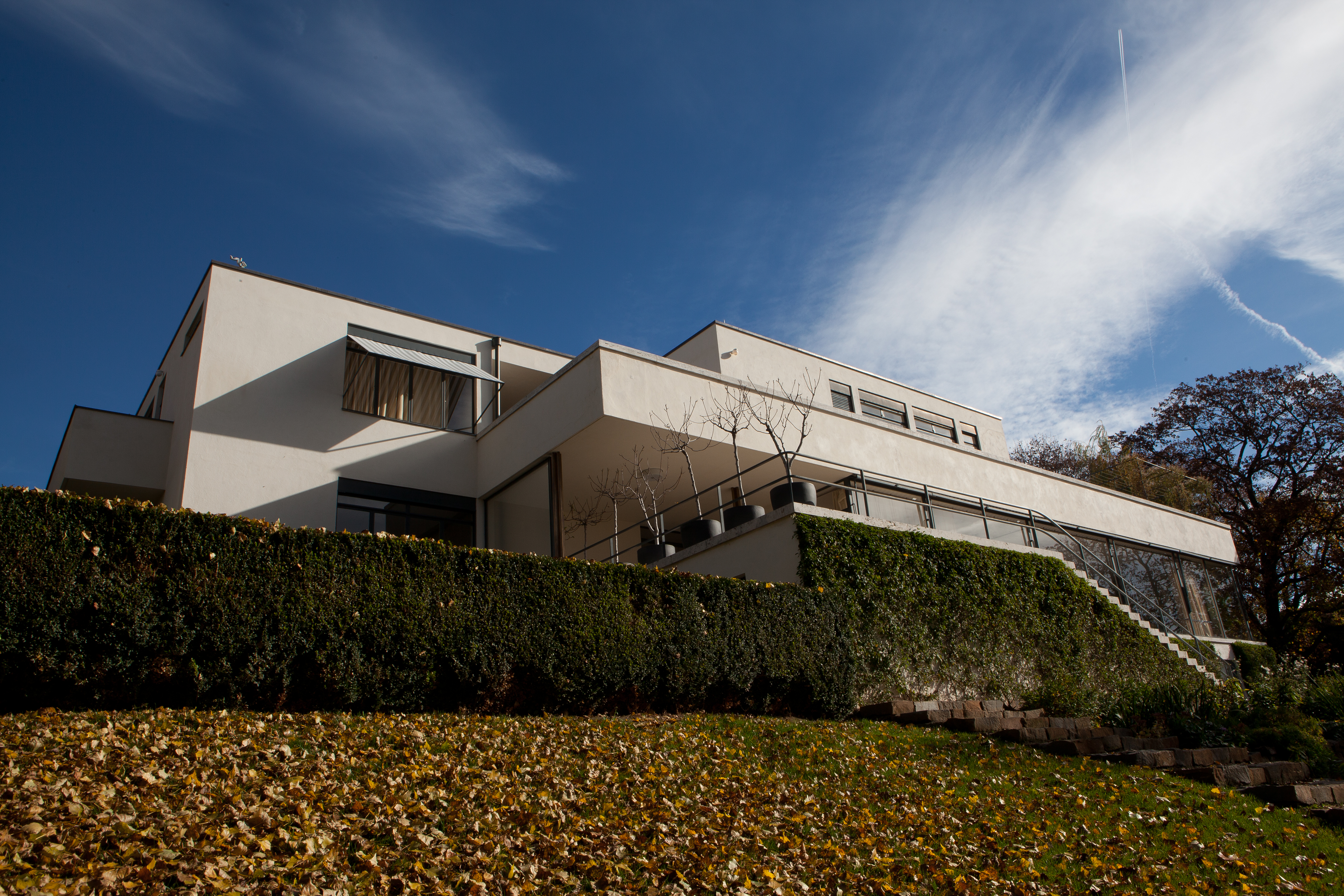 Vila Tugendhat, Černá Pole, Černopolní 237/45, Brno.